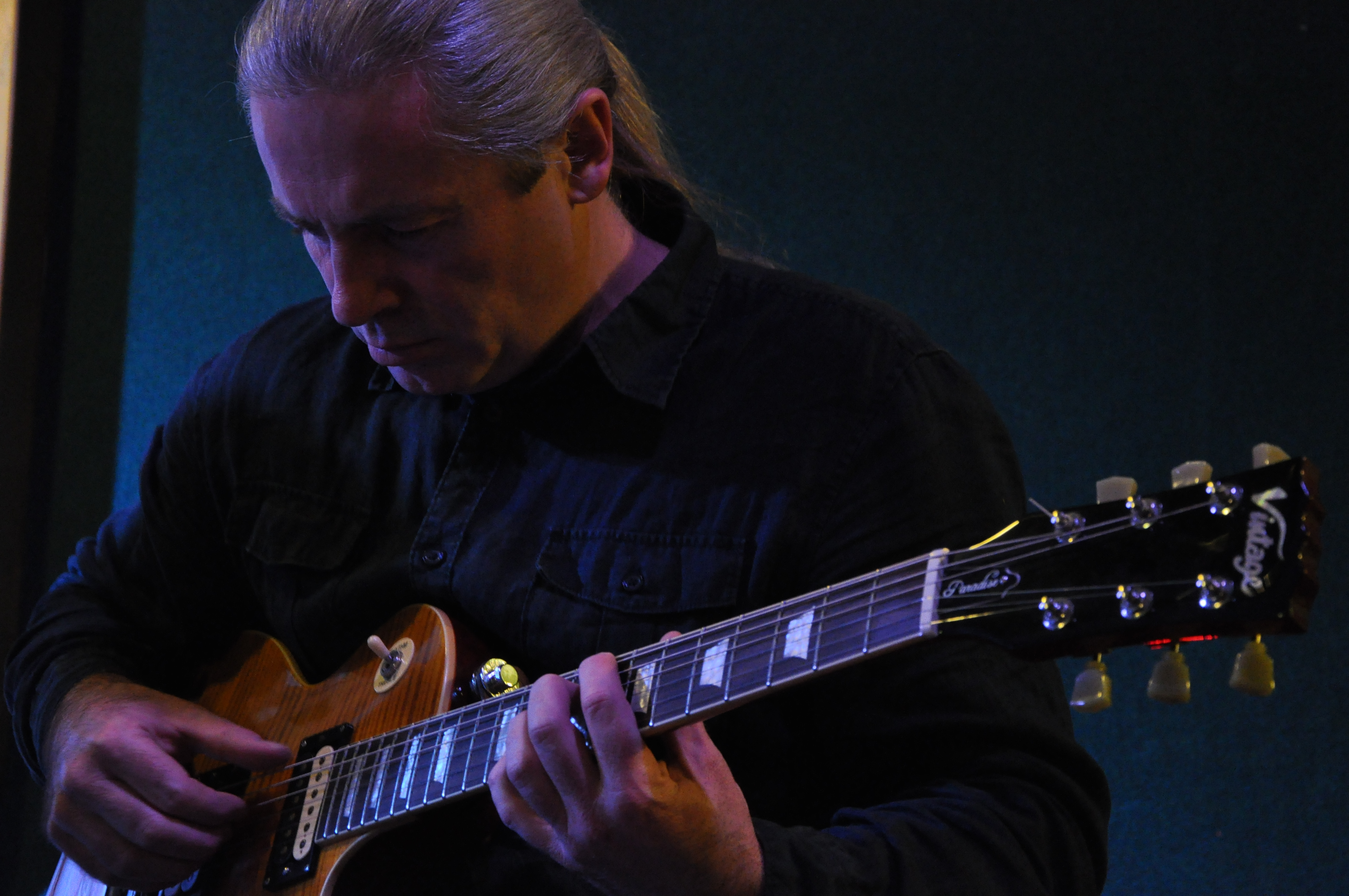 Ivan Manolov